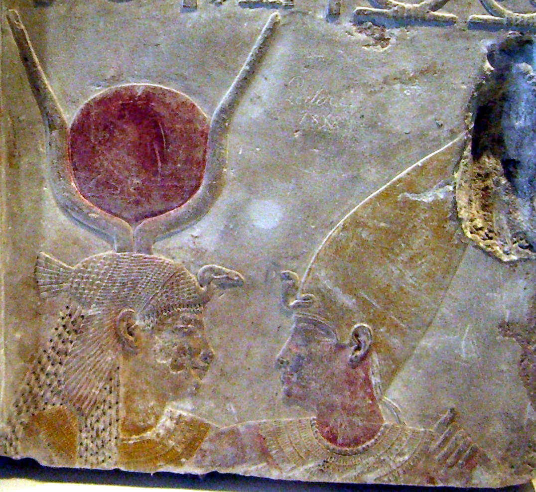 Relief provenant de Saqqarah, représentant la déesse Isis et le pharaon Nectanébo II - XXXe dynastie - Musée du Louvre